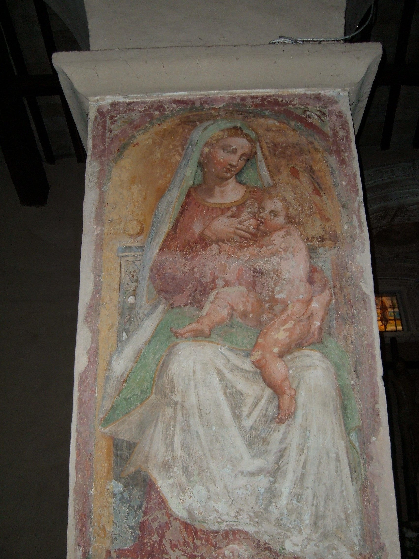 Chiesa di San Pancrazio nel borgo medievale di Isola Farnese a Roma.